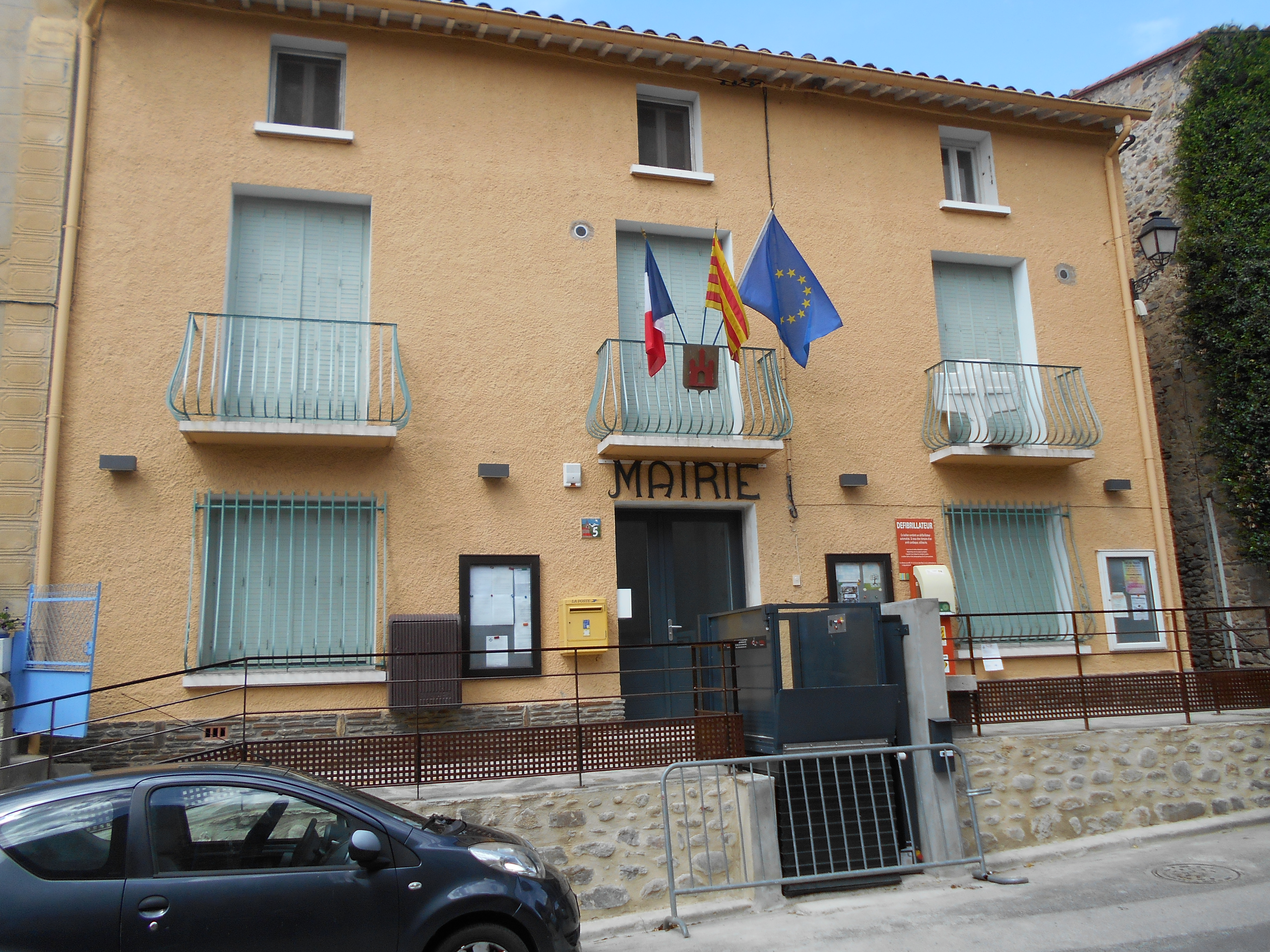 La Casa del Comú de Catllà